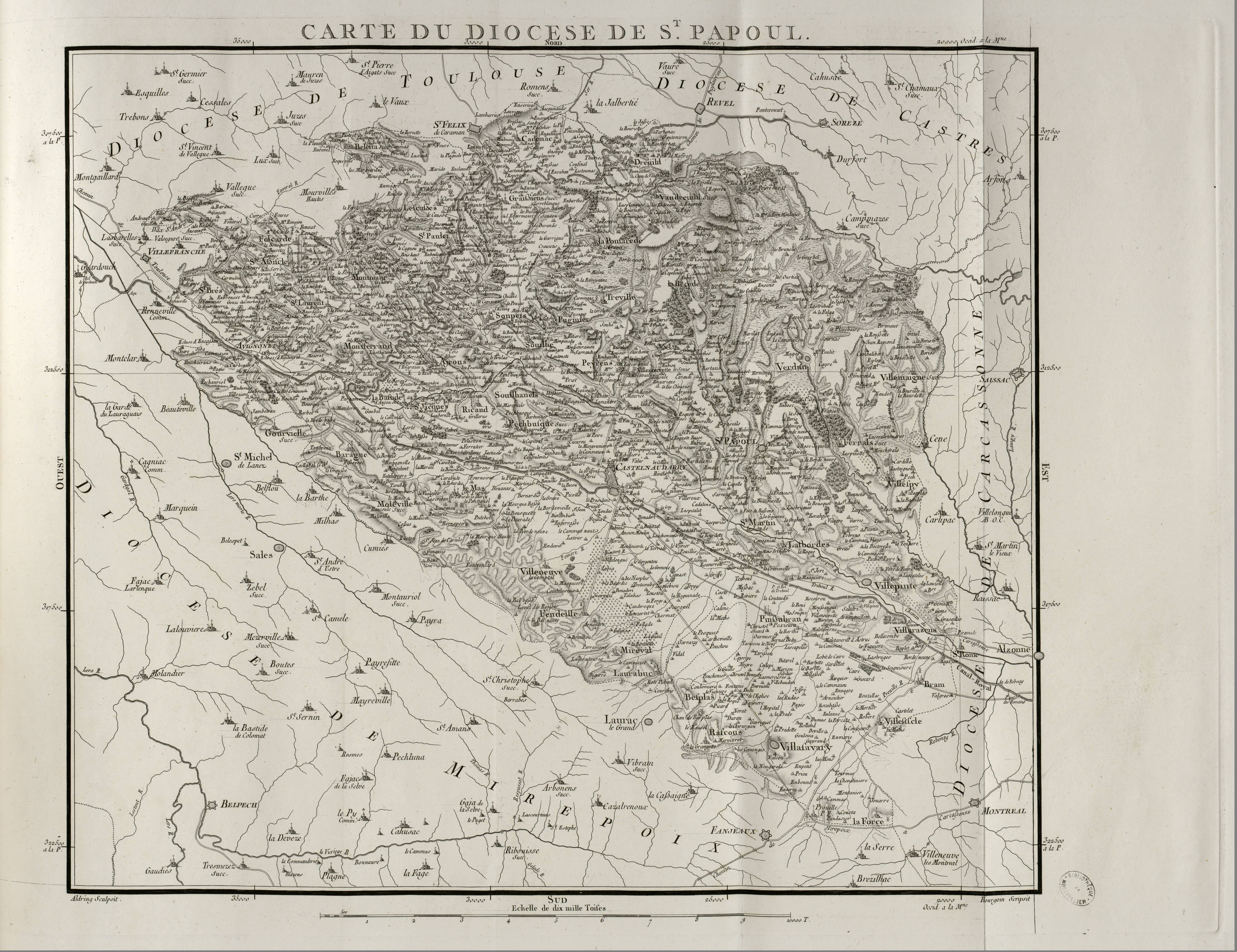 Carte du diocèse de St. Papoul, extraite de Diocèses de la province du Languedoc (1781)